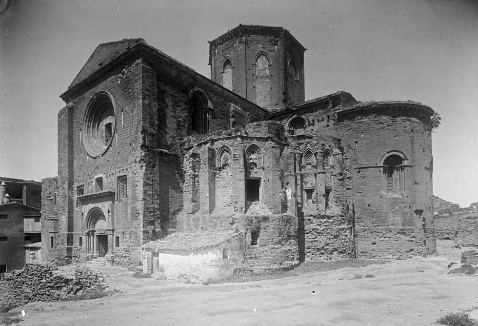 Imatge